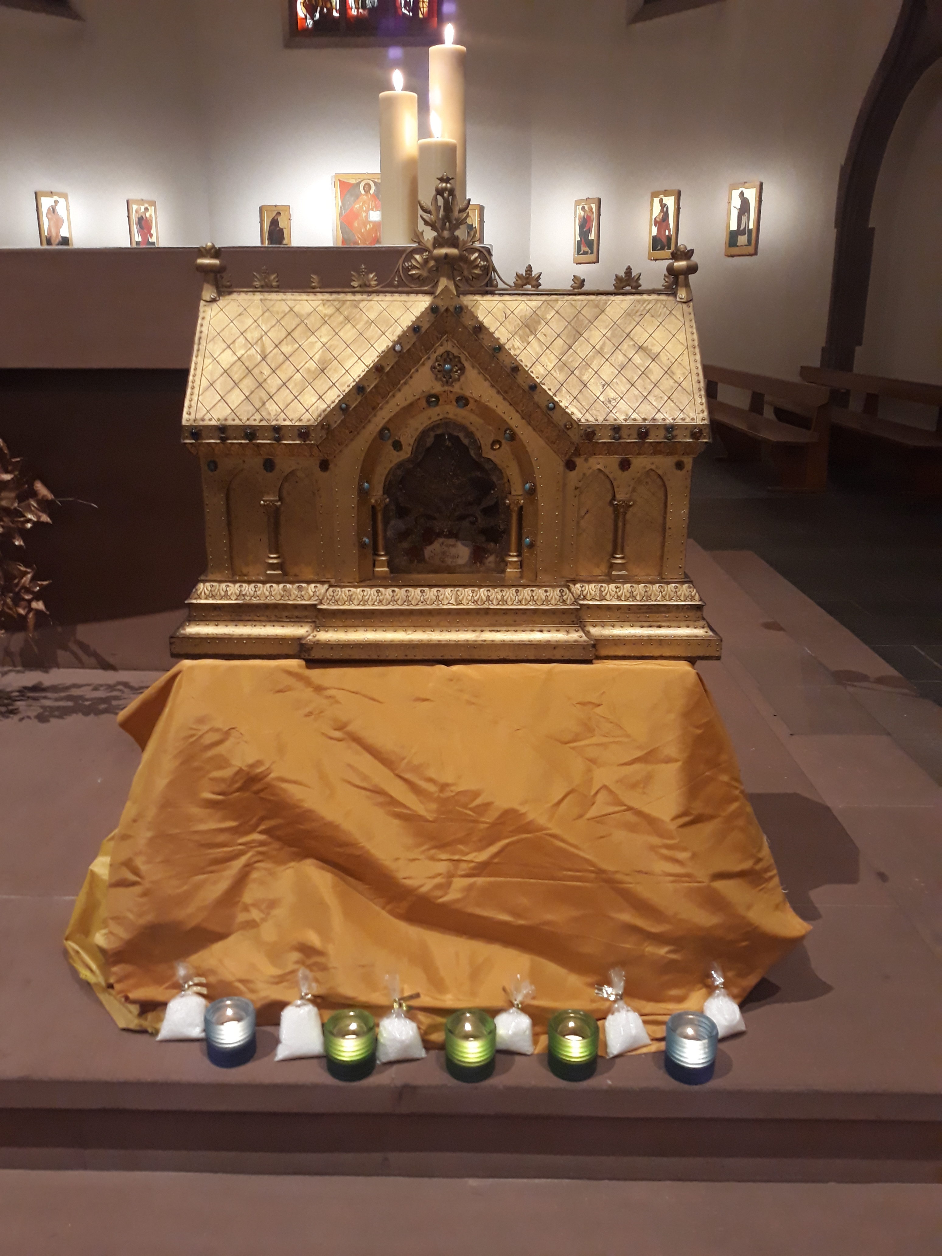 Reliques de Sainte Brigitte d'Irlande conservées à l'église Saint-Pierre-le-Vieux de Strasbourg. Photo prise à l'église Saint-Jean de Strasbourg pour son ostension en janvier 2018.